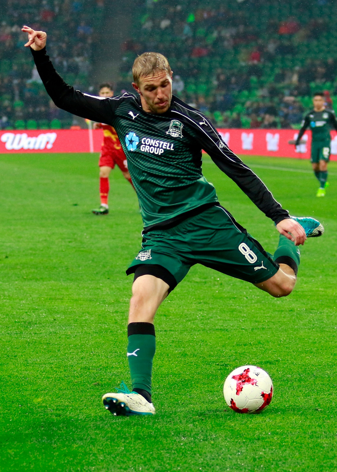 «Краснодар» - «Арсенал»